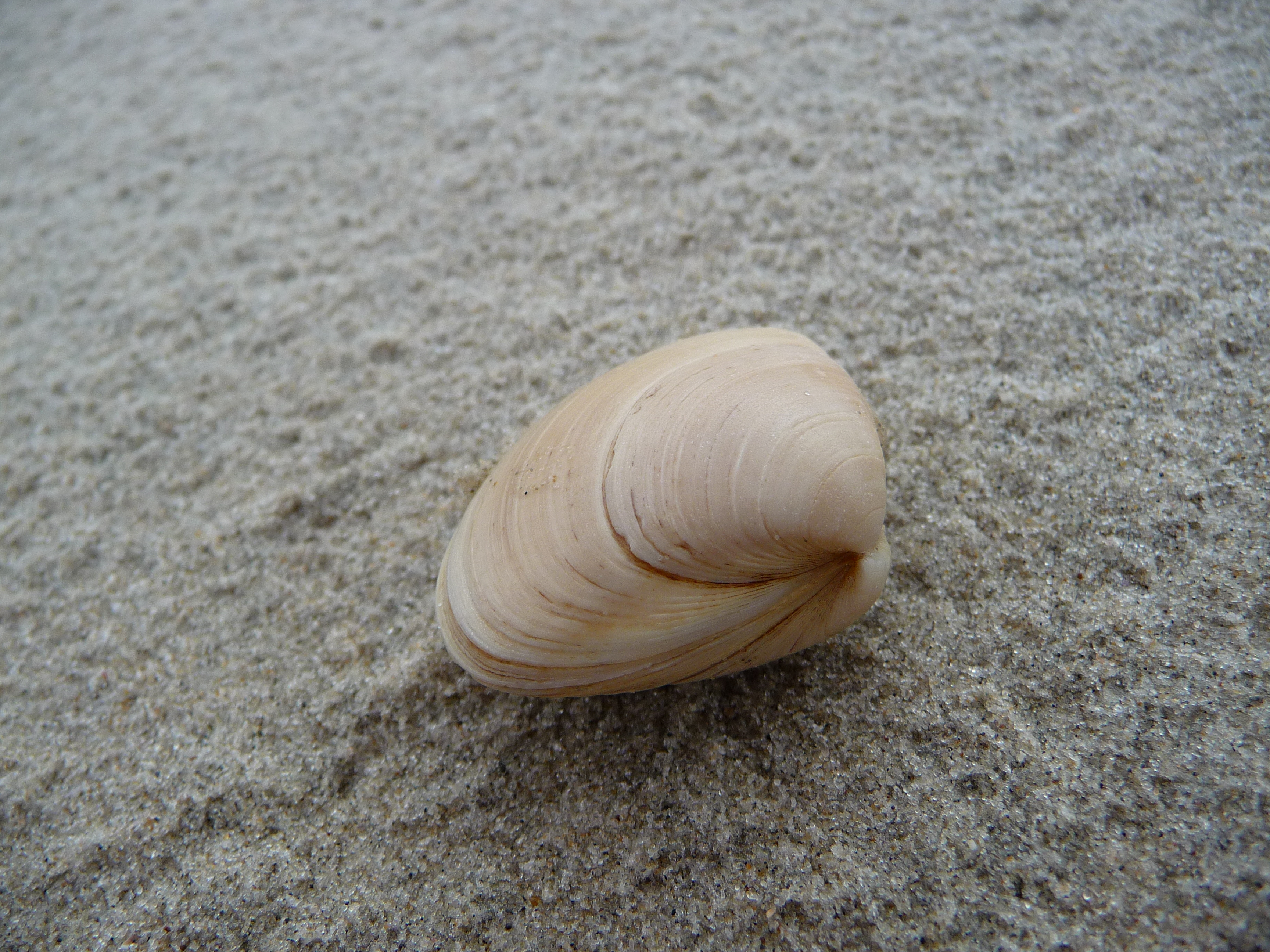 Geschlossene ovale Trogmuschel (Spisula solida), fotografiert am Strand der ostfriesischen Nordseeinsel Juist (Niedersachsen, Deutschland)